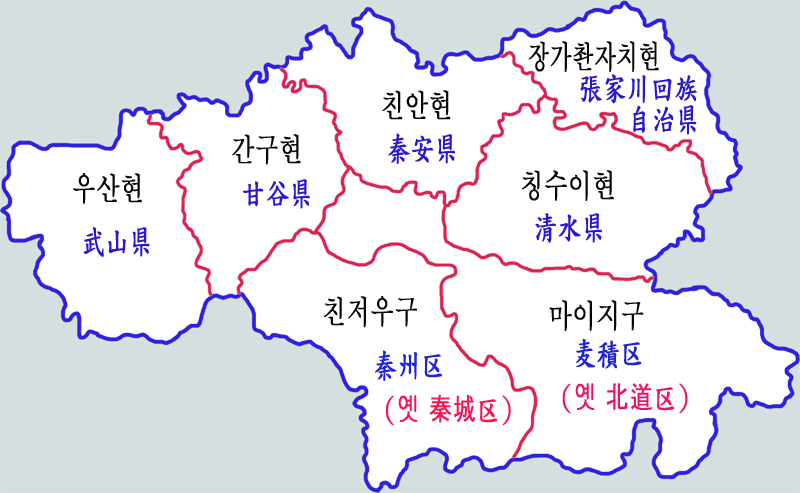 텐수이시 현급행정구역도